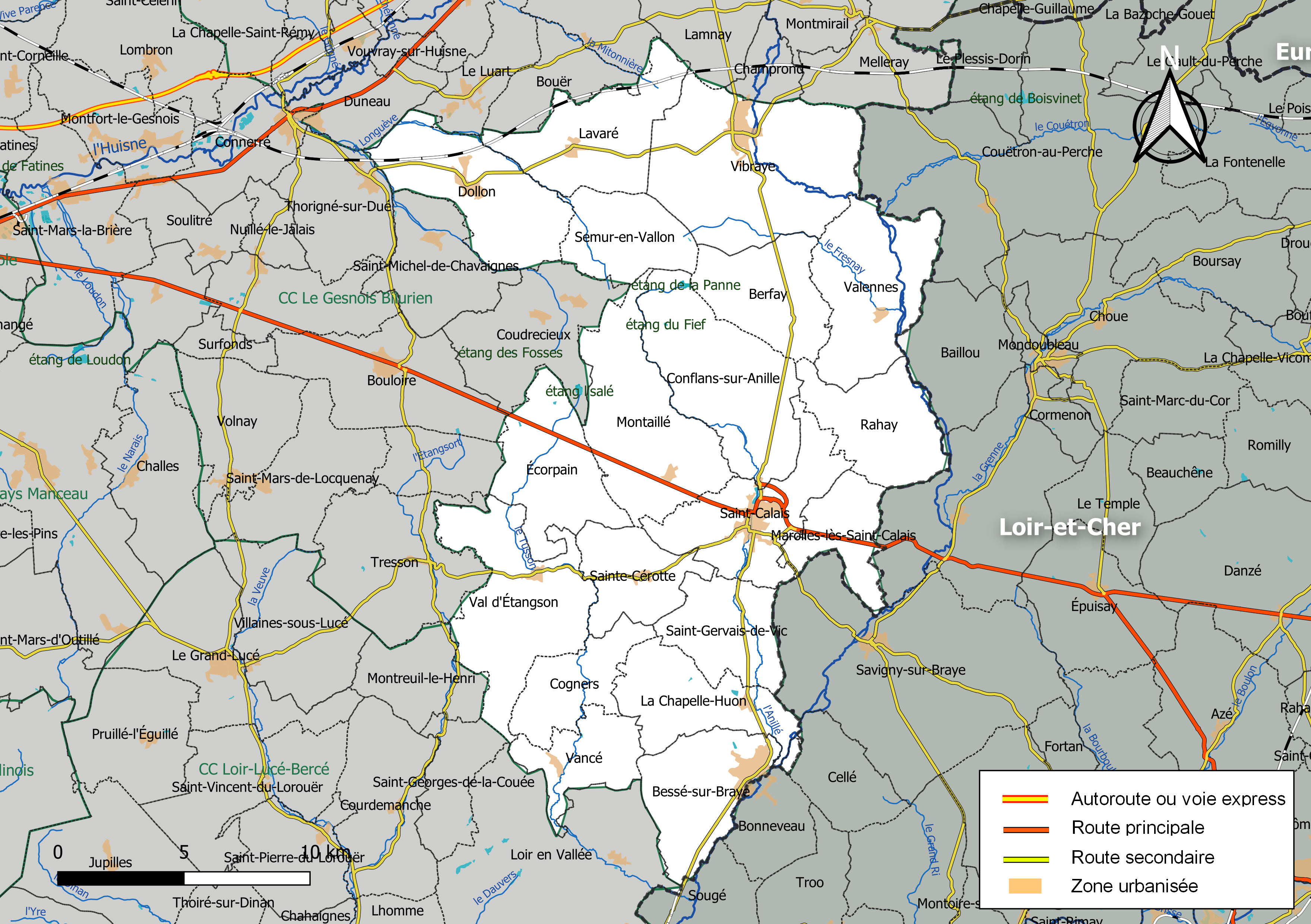 Carte géographique de la Communauté de communes des Vallées de la Braye et de l'Anille, département de la Sarthe, France. Composition au 1er janvier 2019.